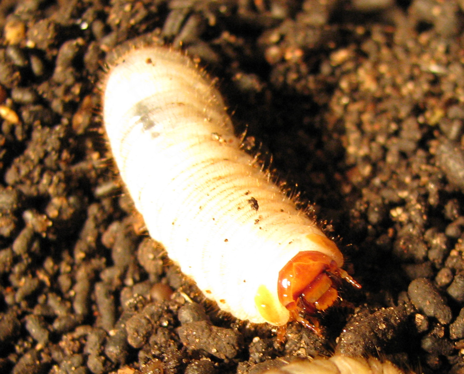 Pachnoda sinuata, larva (Engerling)